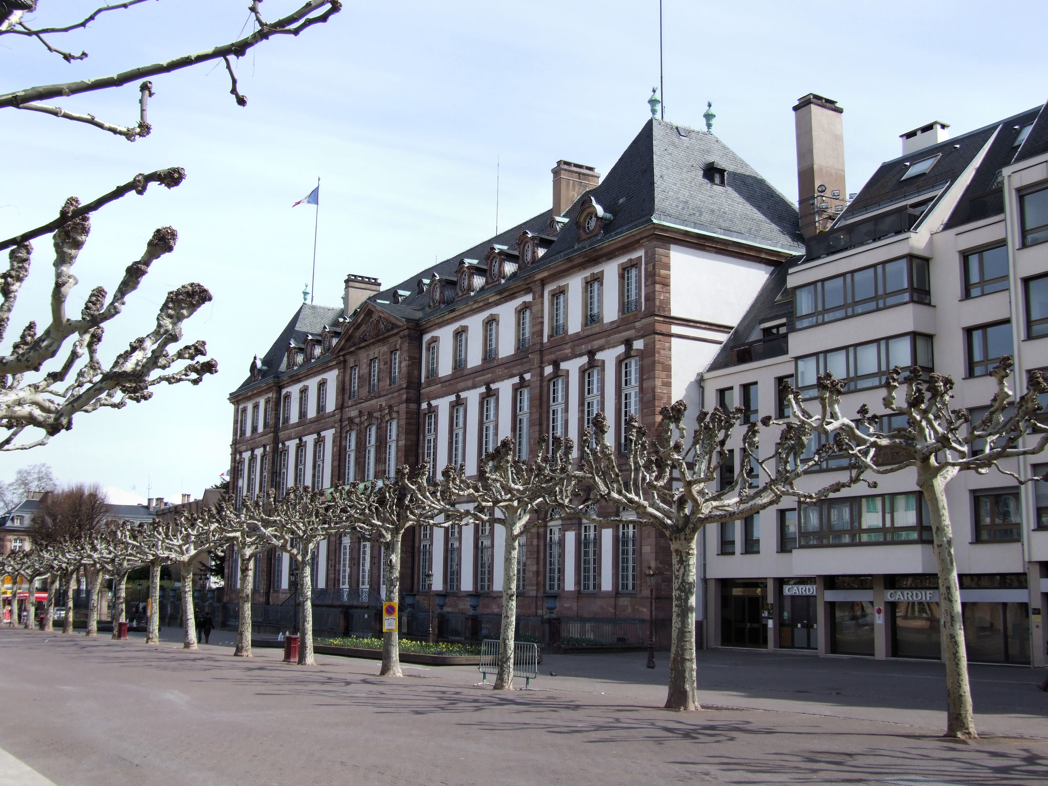 Hôtel de Ville, Place Broglie, Strasbourg